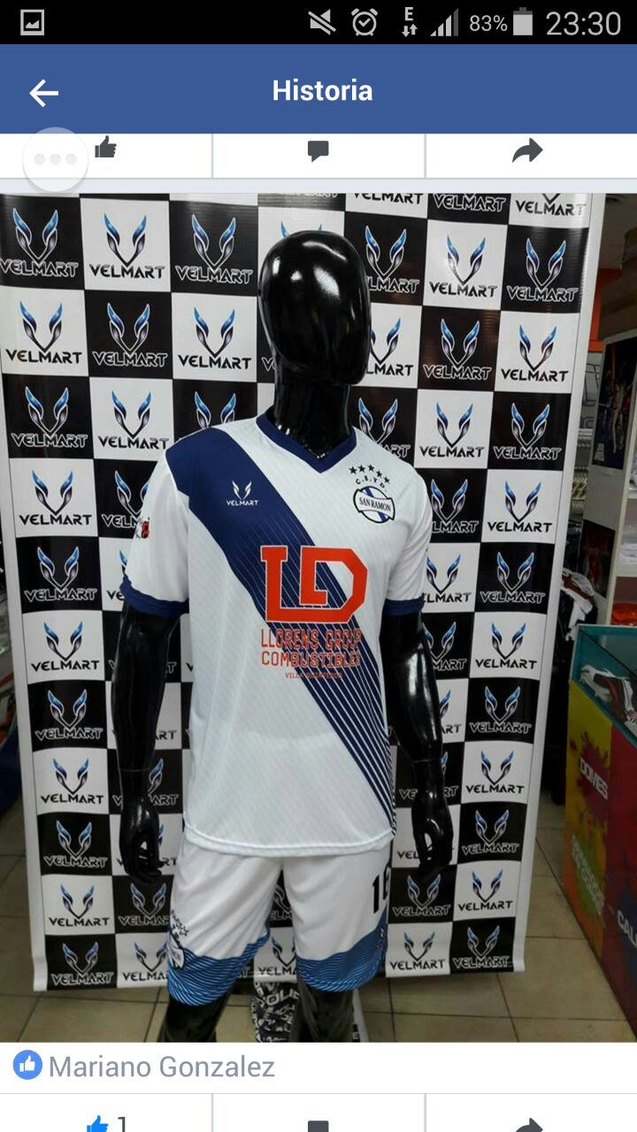 camisetatitular